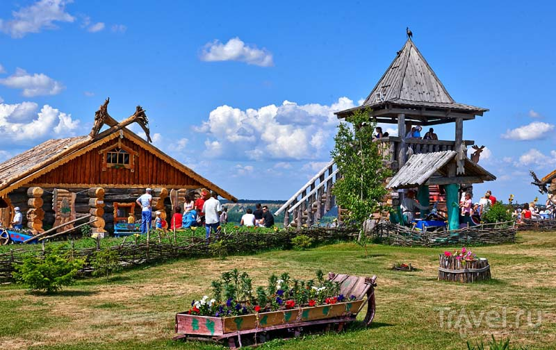 Ялуторовский острог